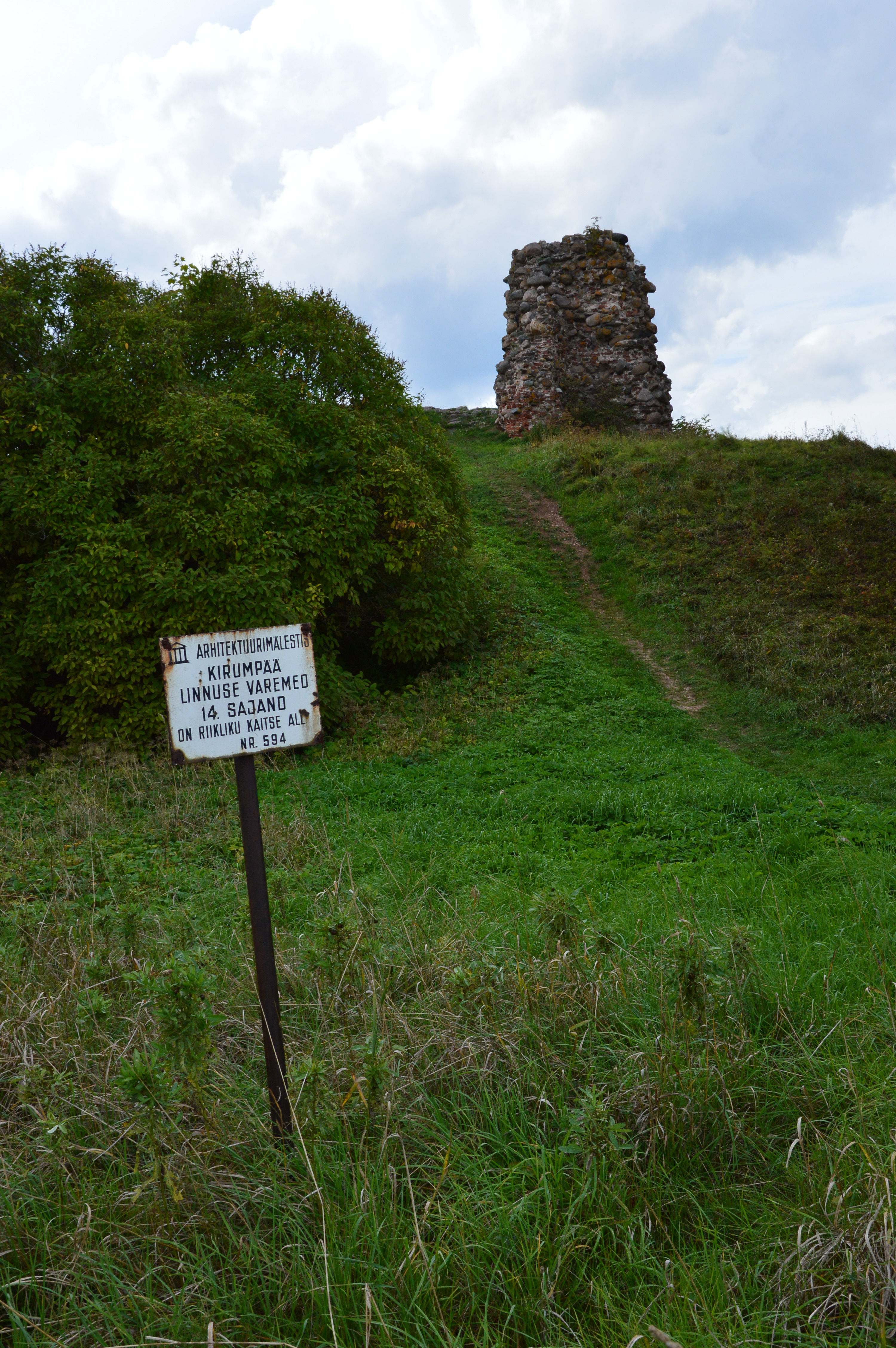 Kirumpää linnus